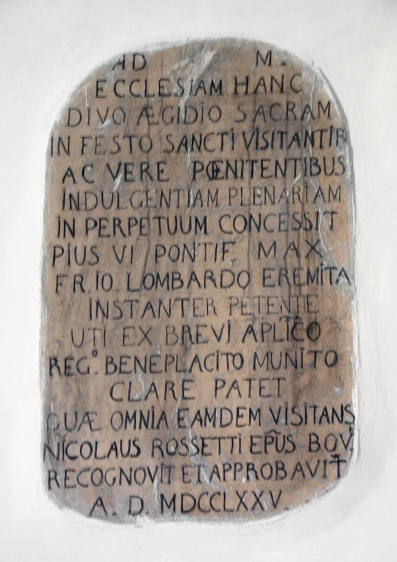 Wikipedia: Bojano.